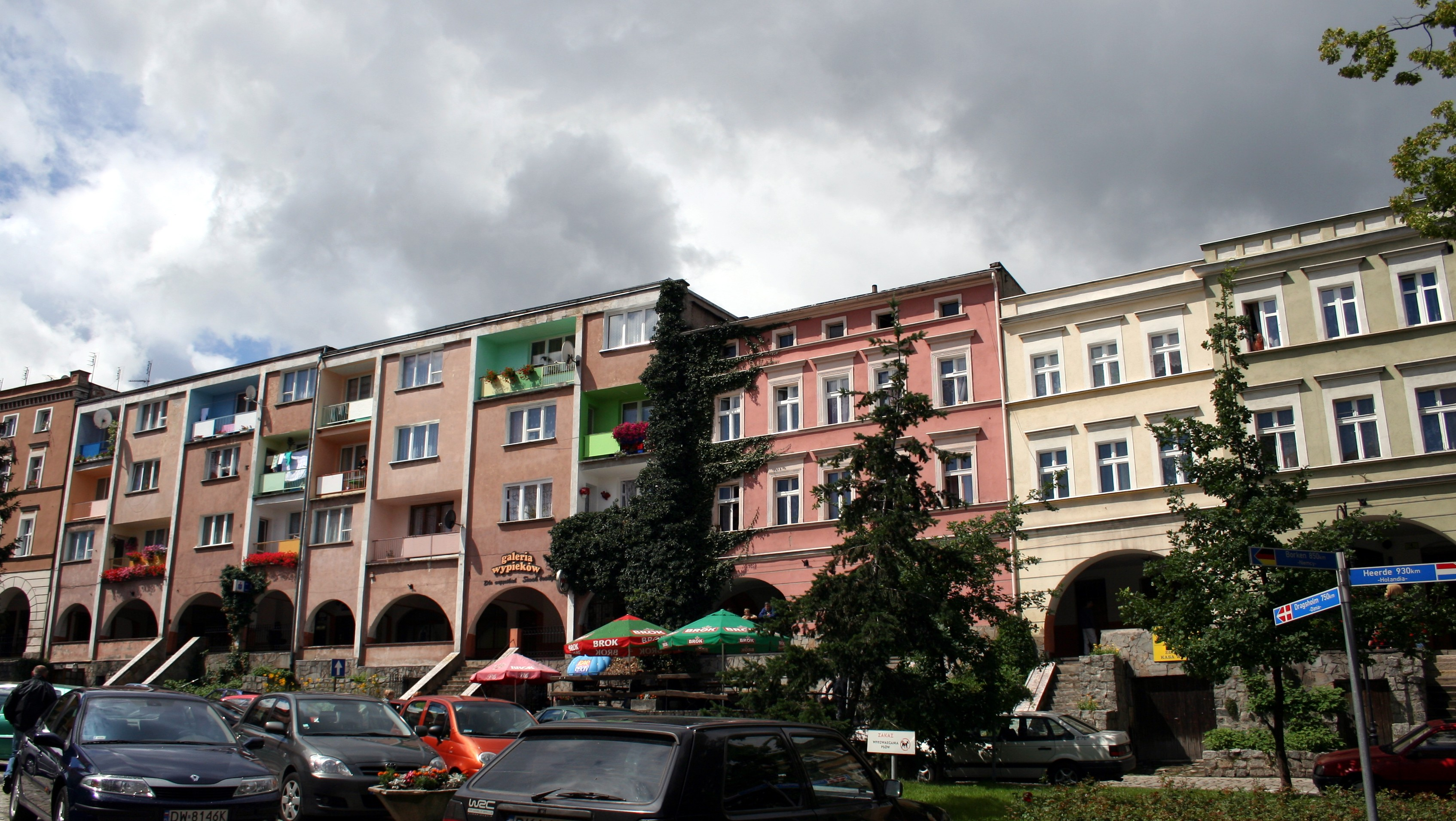 rynek w Bolkowie - fragment